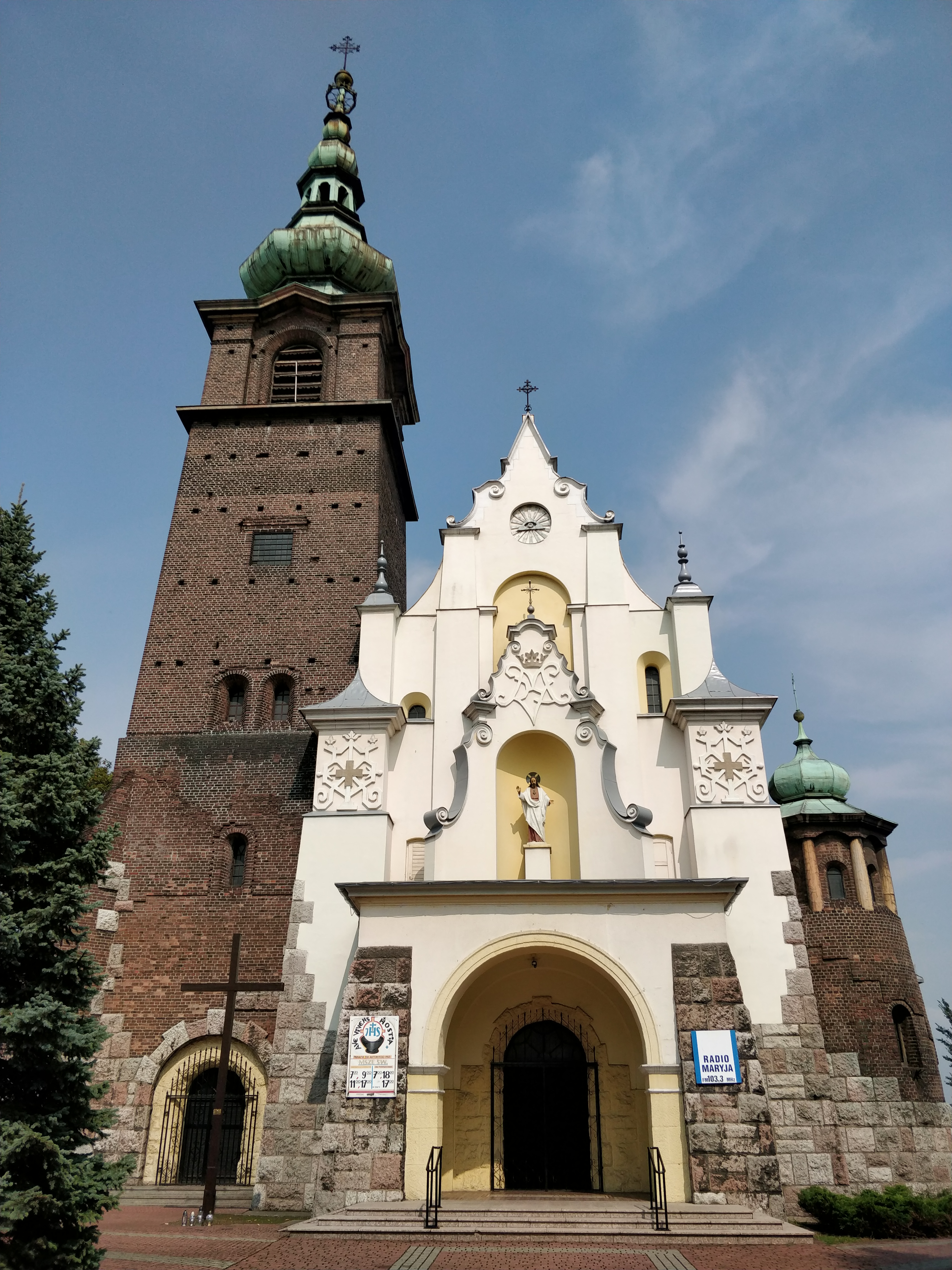 wojkowice